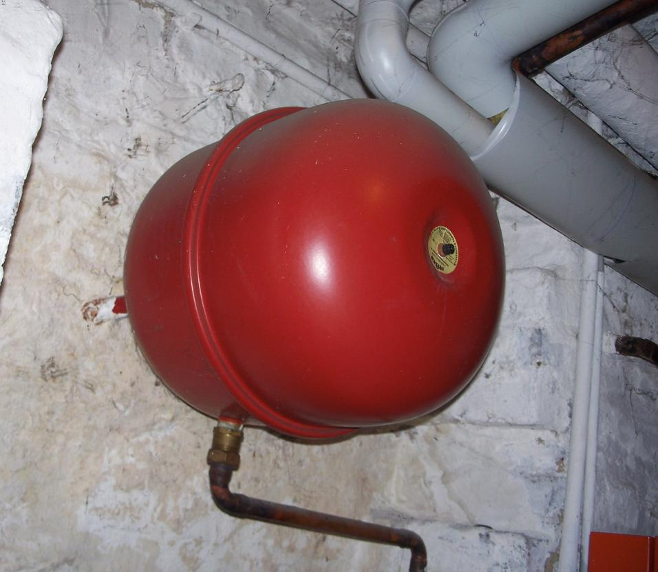 Membran-Ausdehnungsgefäß einer Warmwasserheizung